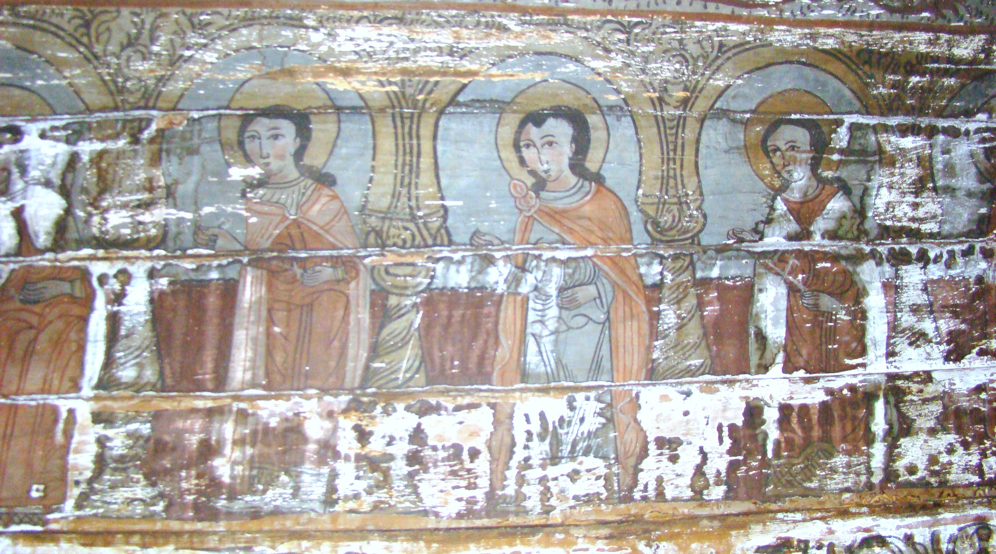 Biserica de lemn din Someșu Rece, județul Cluj